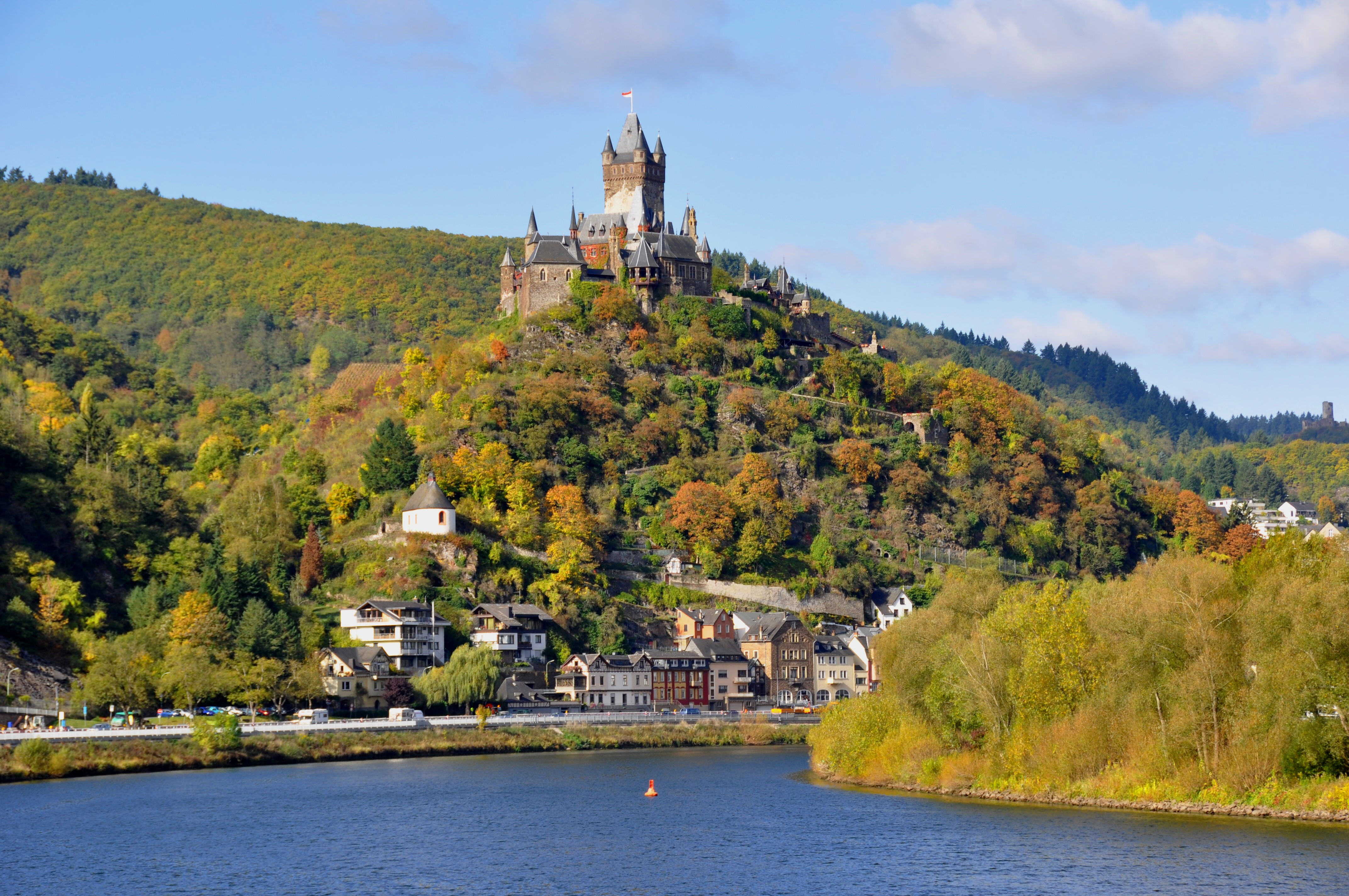 Cochem